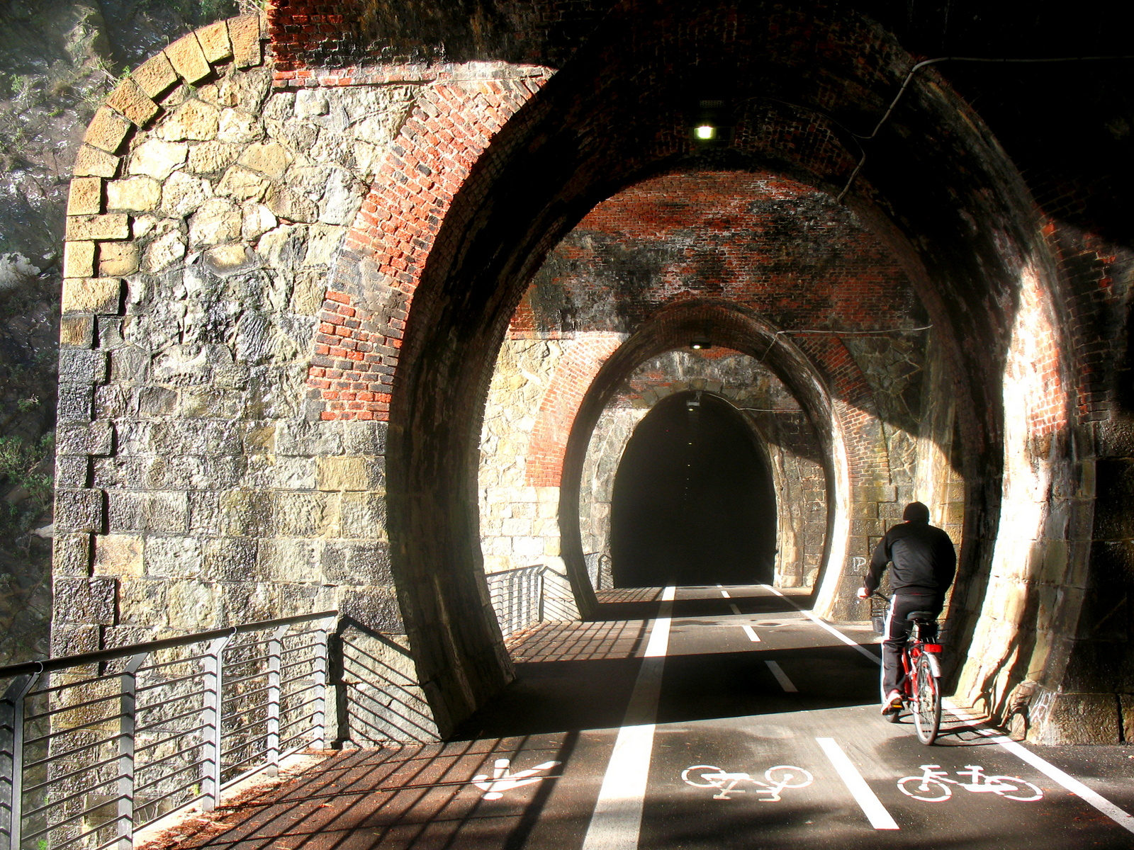 Pista ciclabile Bonassola-Framura